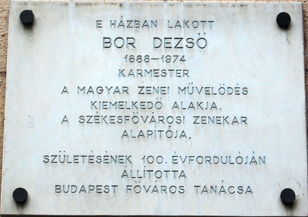 Bor Dezső (karmester) emléktáblája Budapesten a Ferenc tér 4. sz. ház falán, ahol 1932-től 1974-ben bekövetkezett haláláig lakott.